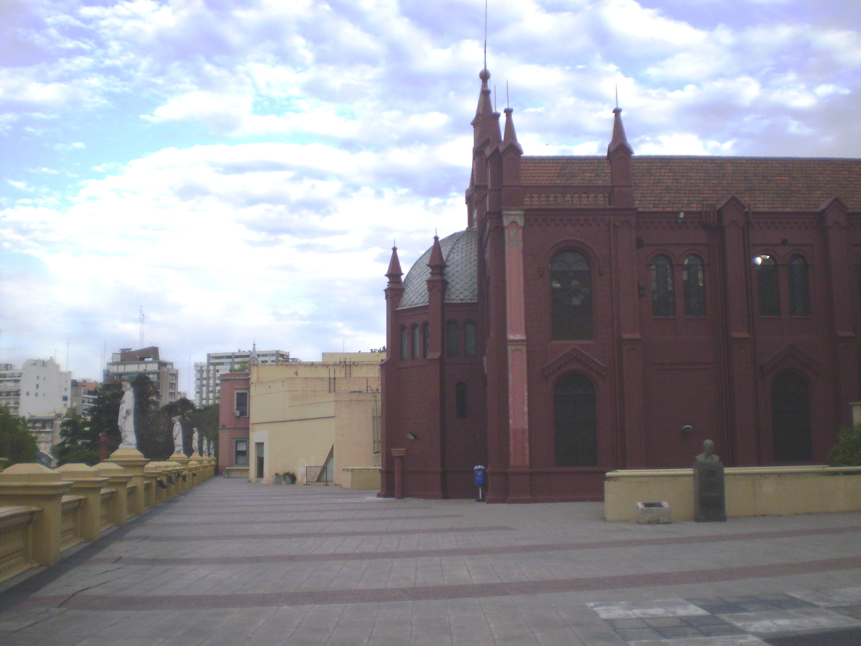 Centro Cultural Recoleta (Buenos Aires, Argentina). Terraza y auditorio El Aleph